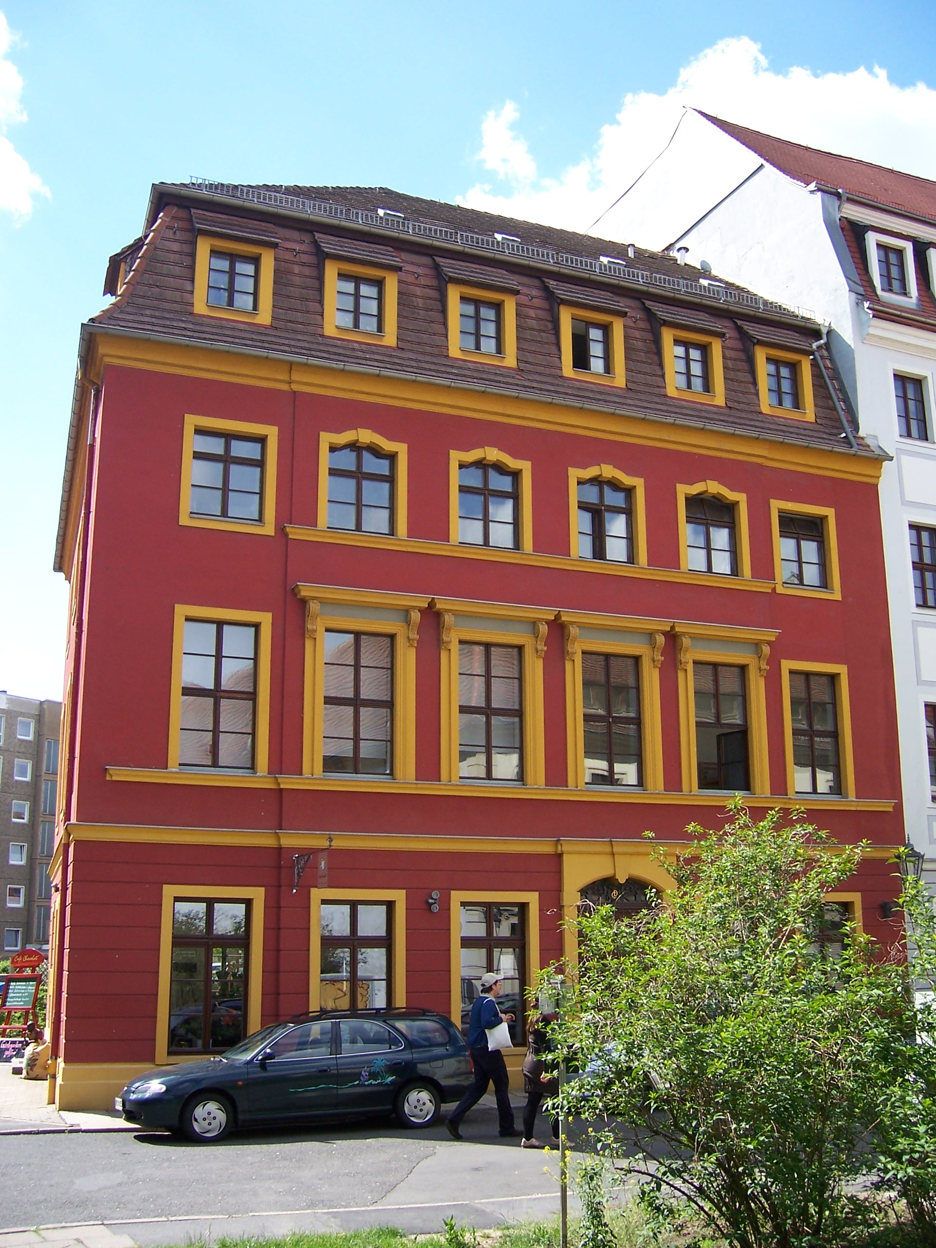 Haus Rähnitzgasse 7 in der Inneren Neustadt in Dresden